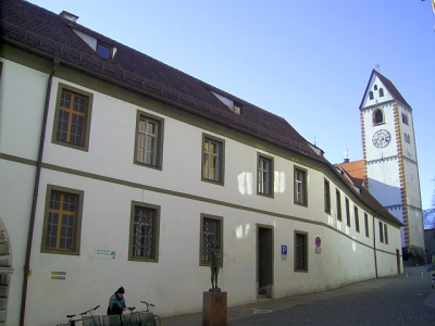 Kloster Sankt Mang Füssen